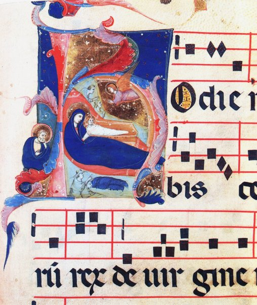 Neri da Rimini Antifonario, XIV d.C. Museo Civico Medievale, Bologna